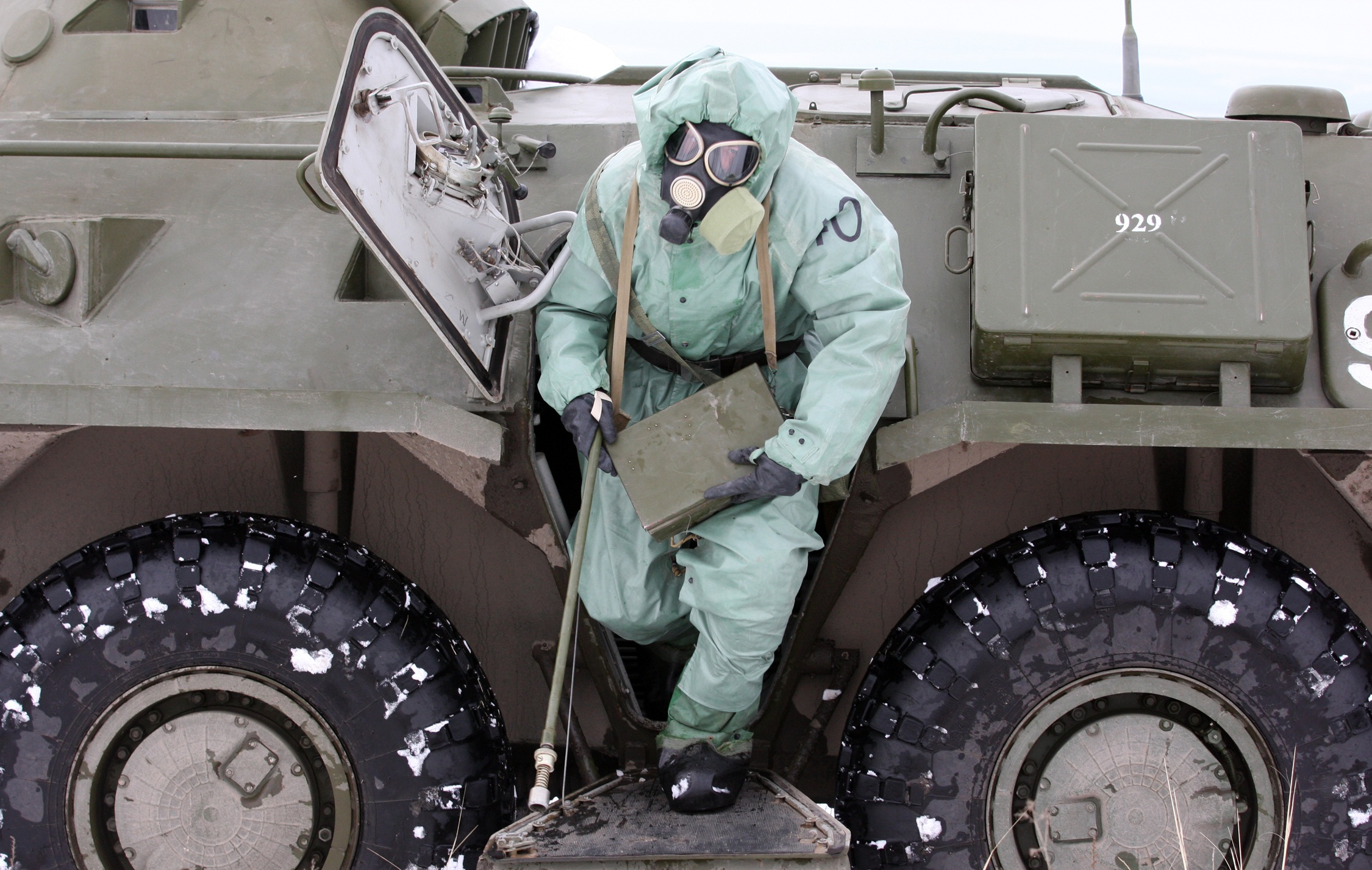 Машина химической и радиационной разведки РХМ-4-01.